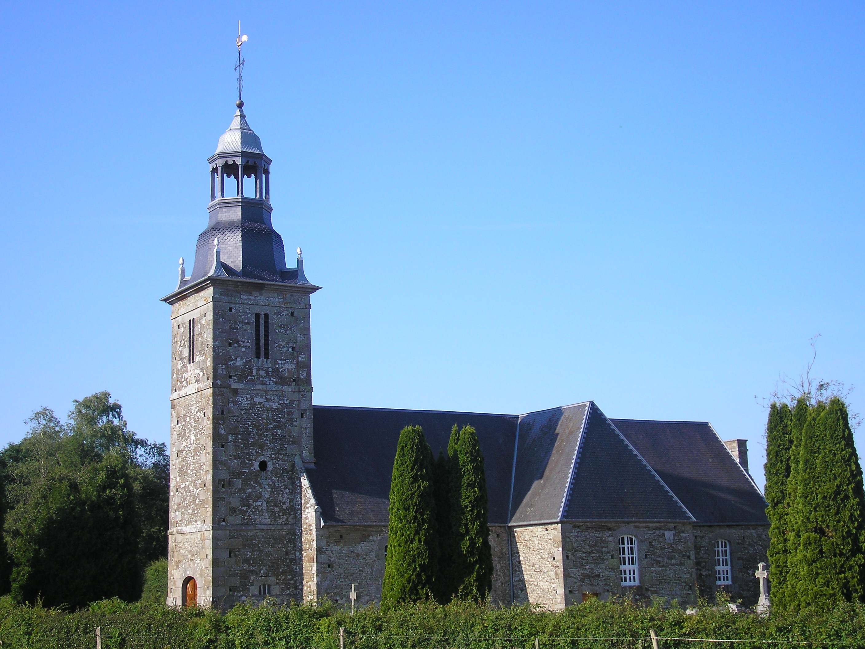 Folligny (Normandie, France). L'église de La Beslière.